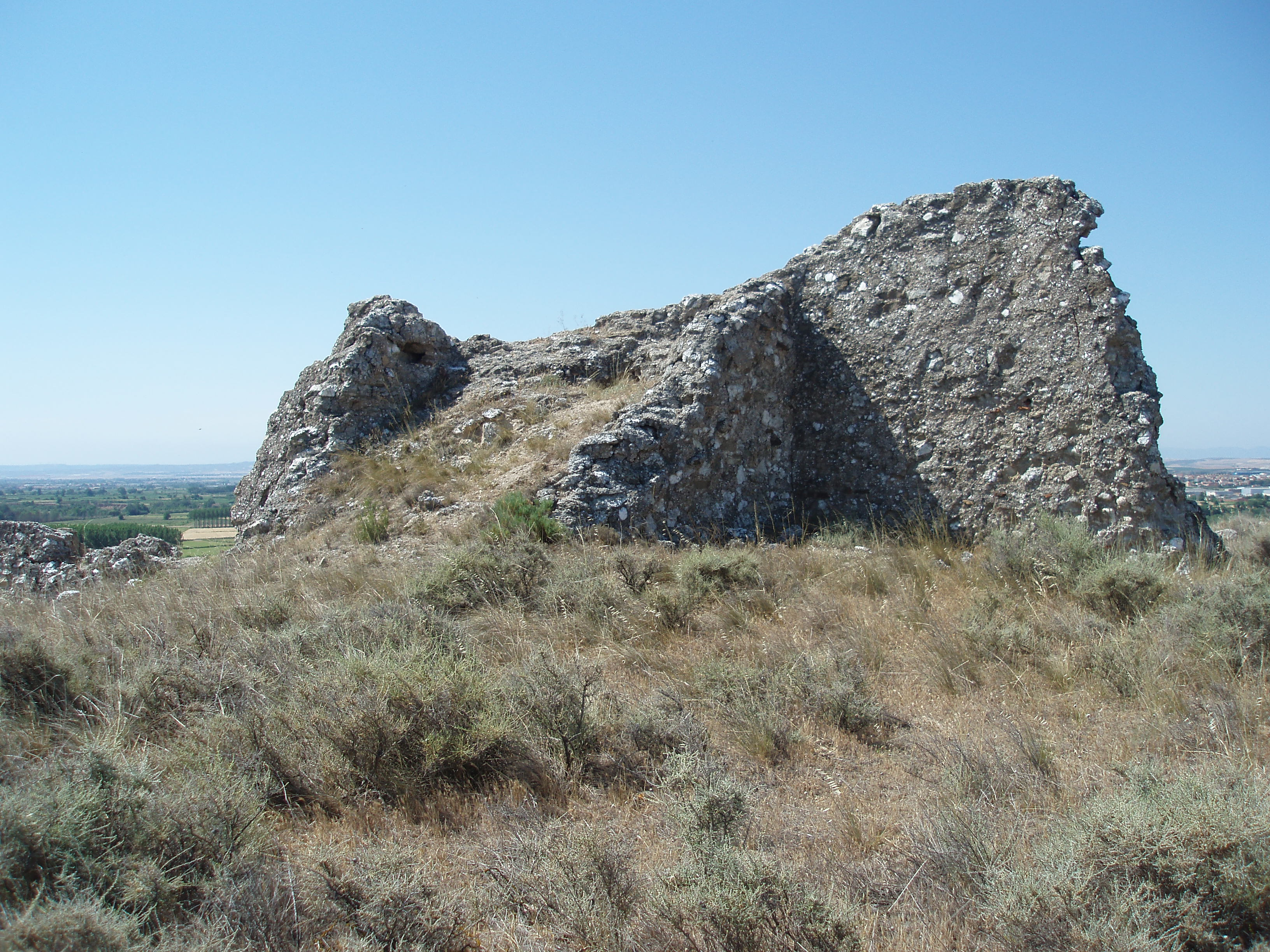 Ruinas de Santa Inés.